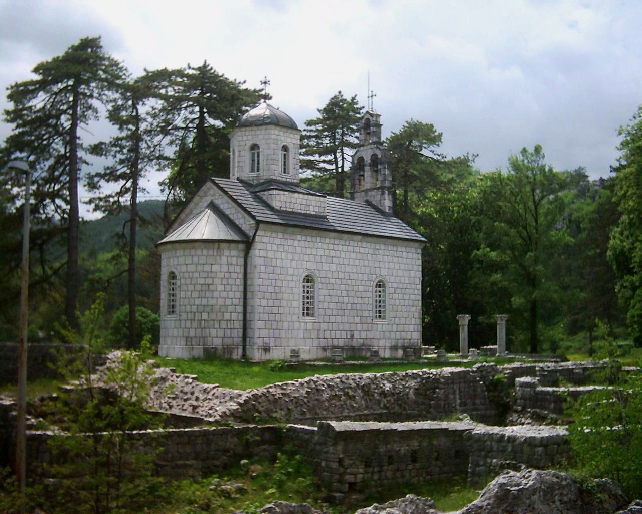 Mausolée de Nicolas I du Monténégro à Cetinje